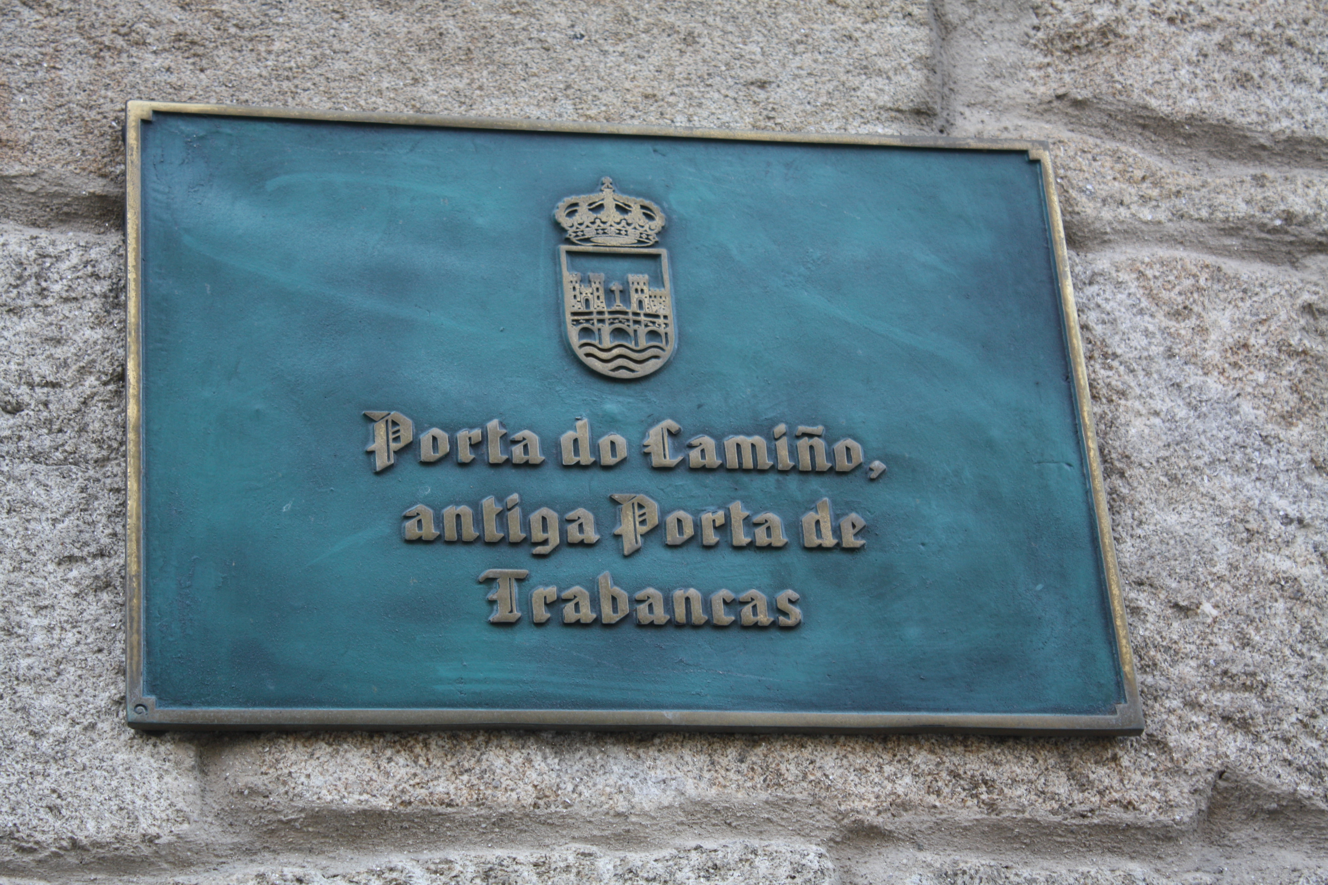 Placa que lembra o lugar onde estivo a Porta de Trabancas, por onde entraba o Camiño de Santiago Portugués na cidade amurallada.